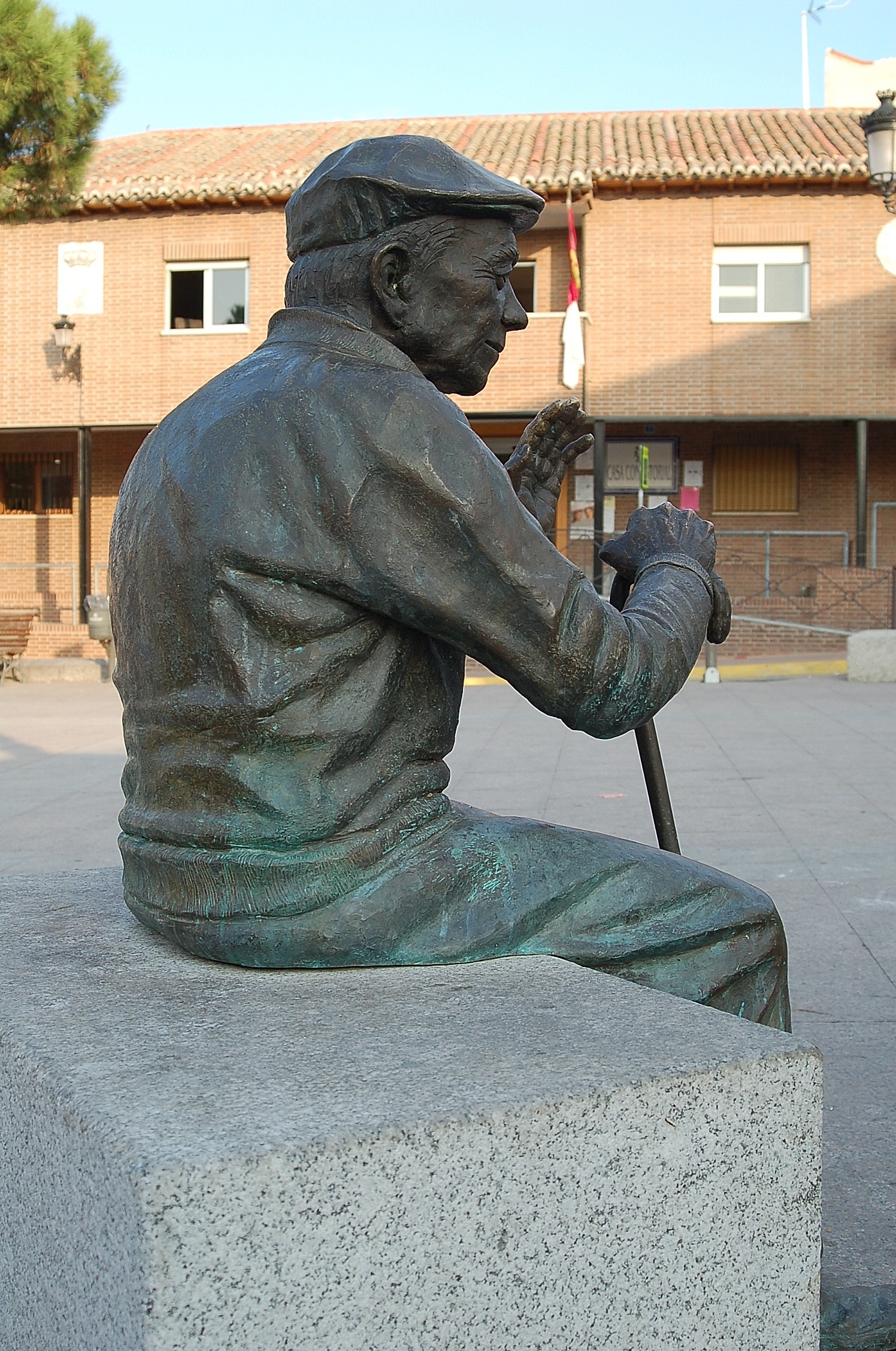 Grupo Escultórico, figura en bronce, homenaje a nuestros mayores, Plaza de España.